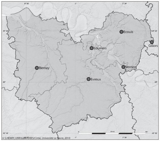 La carte des centre anti-tuberculeu dans l'Eure en 1930